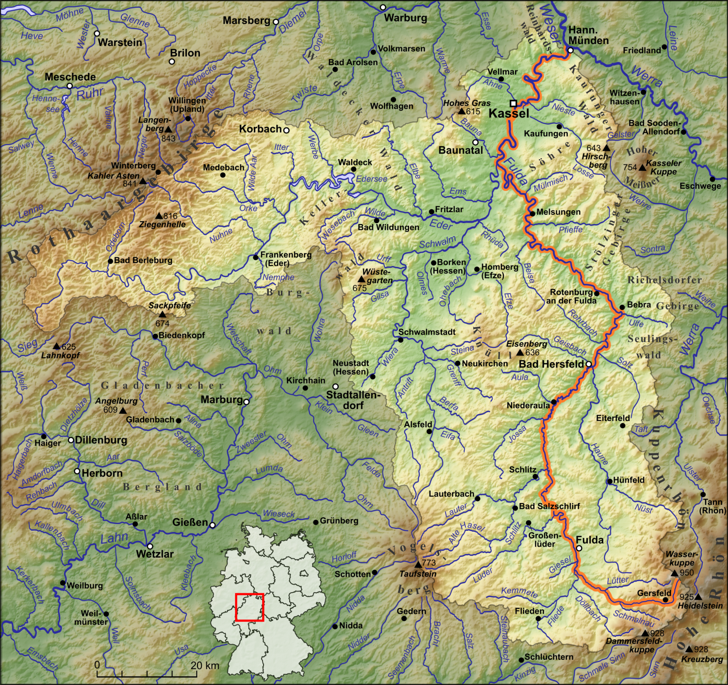 Die Fulda, ihre Nebenflüsse und das Wassereinzugsgebiet begrenzt durch die Wasserscheiden